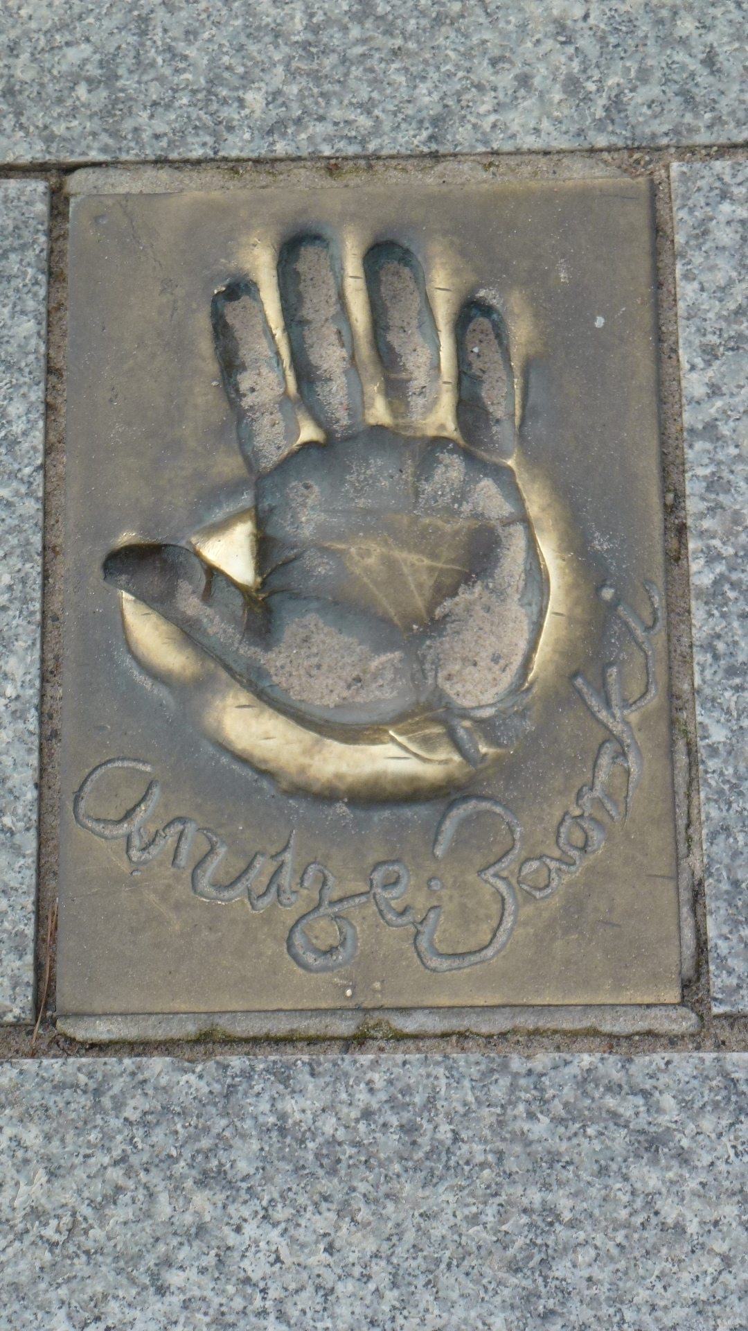 Odcisk gwiazdy na ul. Aleji Gwiazd w Międzyzdrojach woj. zachodniopomorskie pow. kamieński